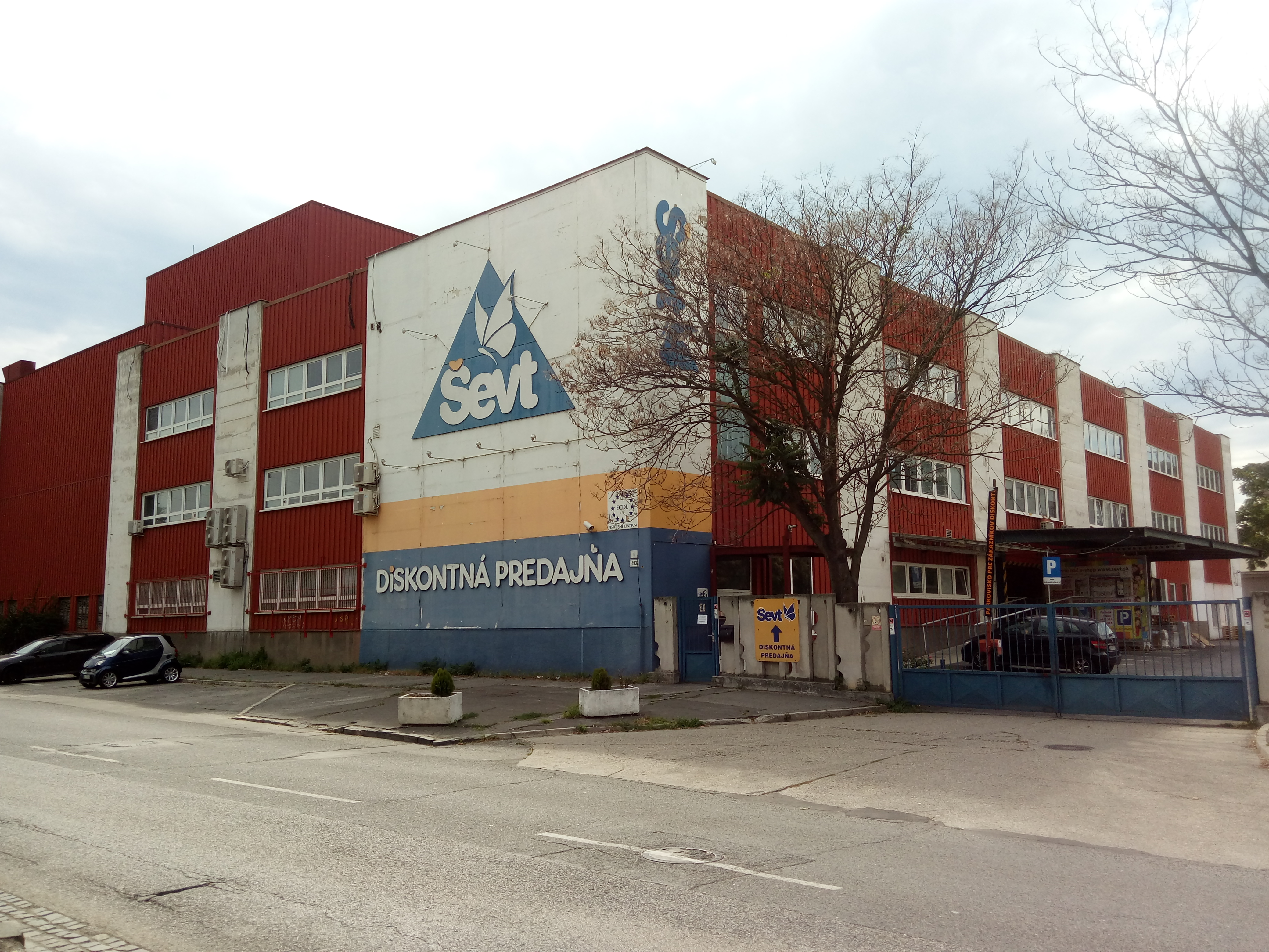 Plynárenská 6, Ružinov, Bratislava